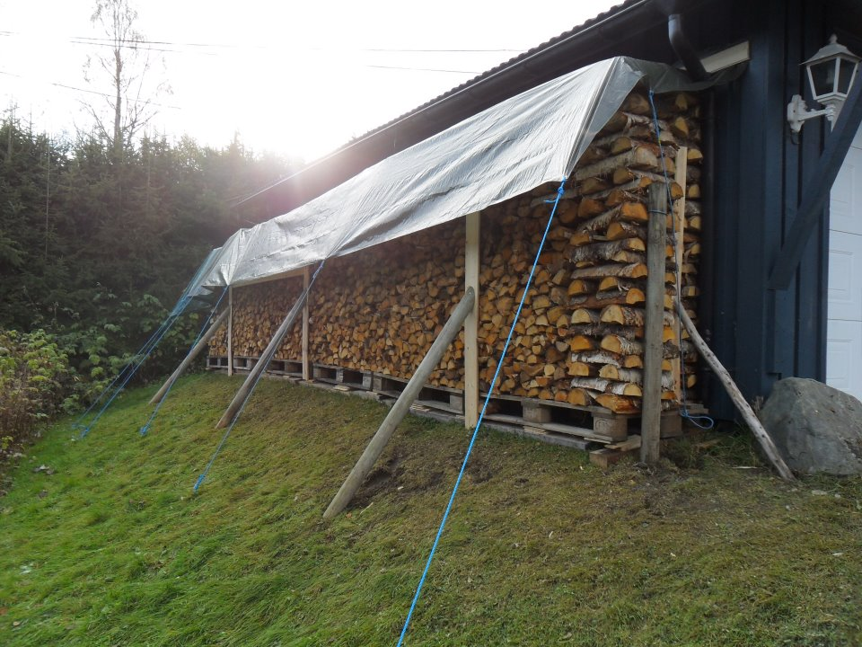 En pent oppsatt vedbrått oppstablet mot en vegg.